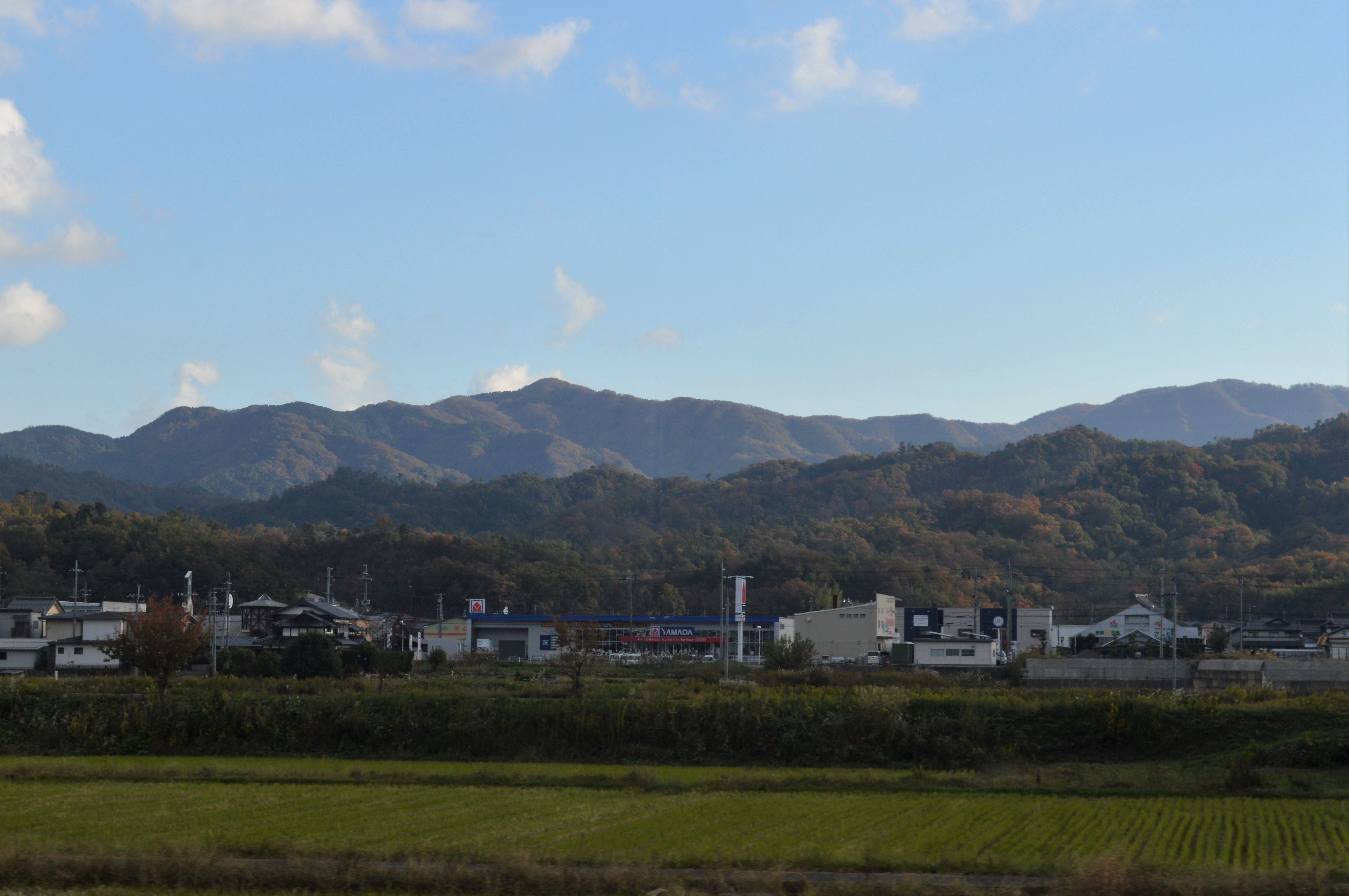 京都府京丹後市弥栄町の金剛童子山。614m。京丹後市大宮町から撮影。